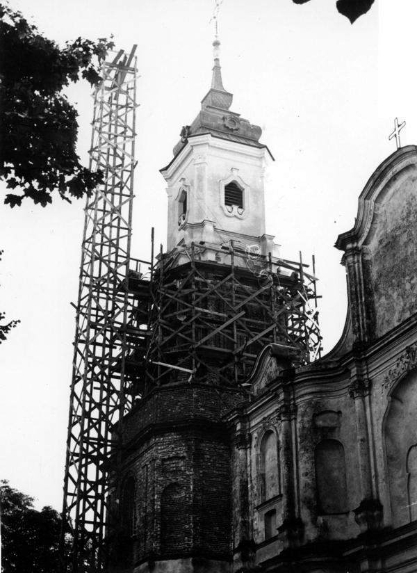 Odbudowa wiezy